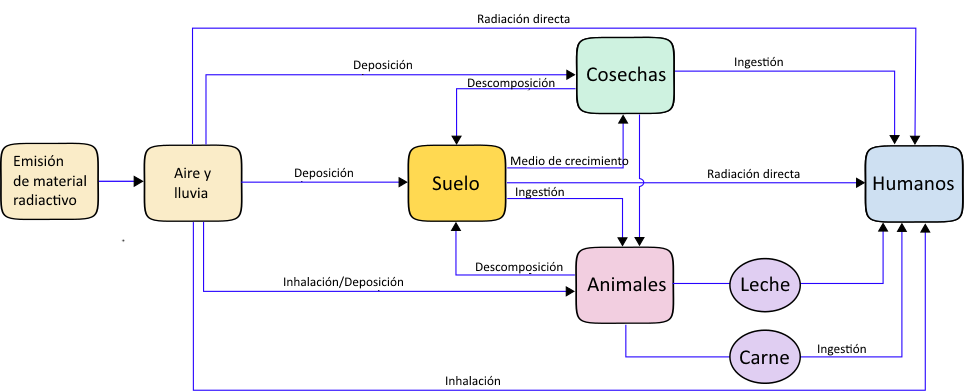 Este gráfico muestra la transmisión de materiales radiactivos de la atmósfera a los humanos.